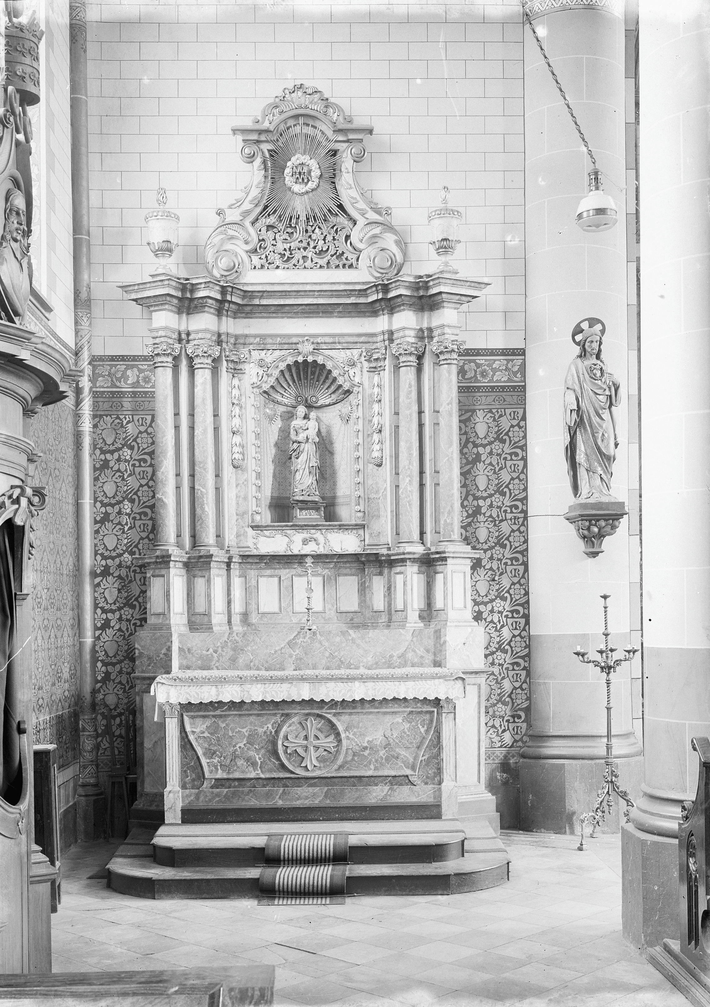 Rooms-Katholieke Kerk: altaren